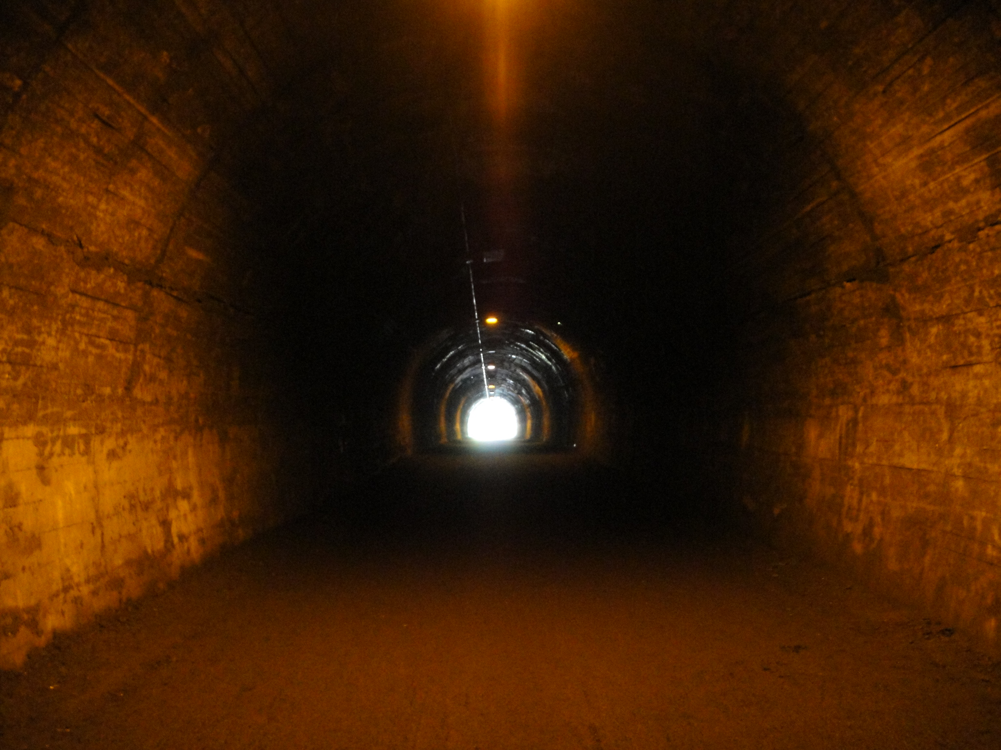 旧吹上トンネル内部